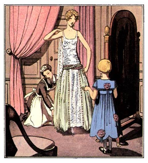 Illustration from La Gazette du Bon Ton, 1922, "Deux modèles de Jeanne Lanvin"